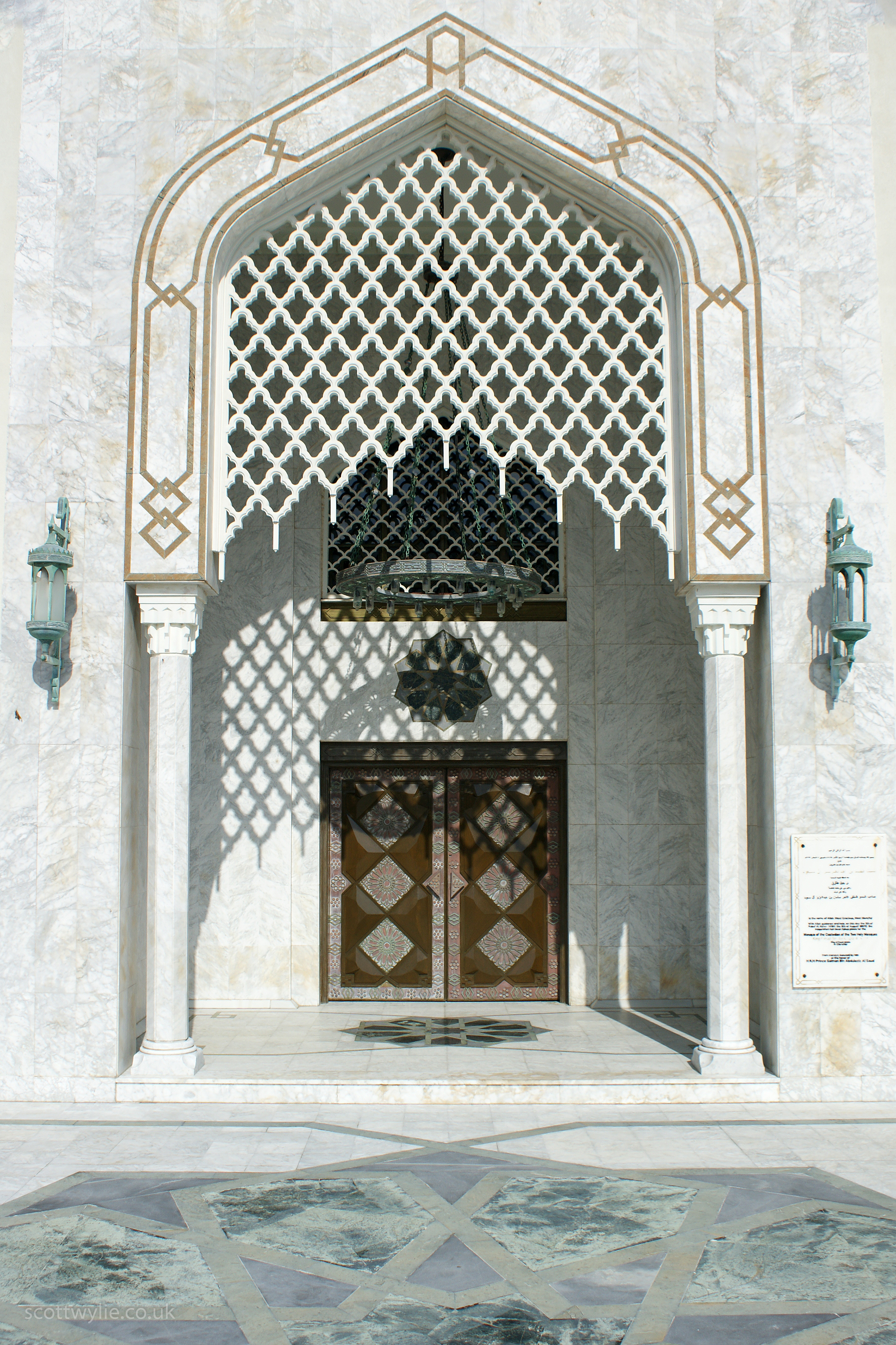 Gibraltar mosque door